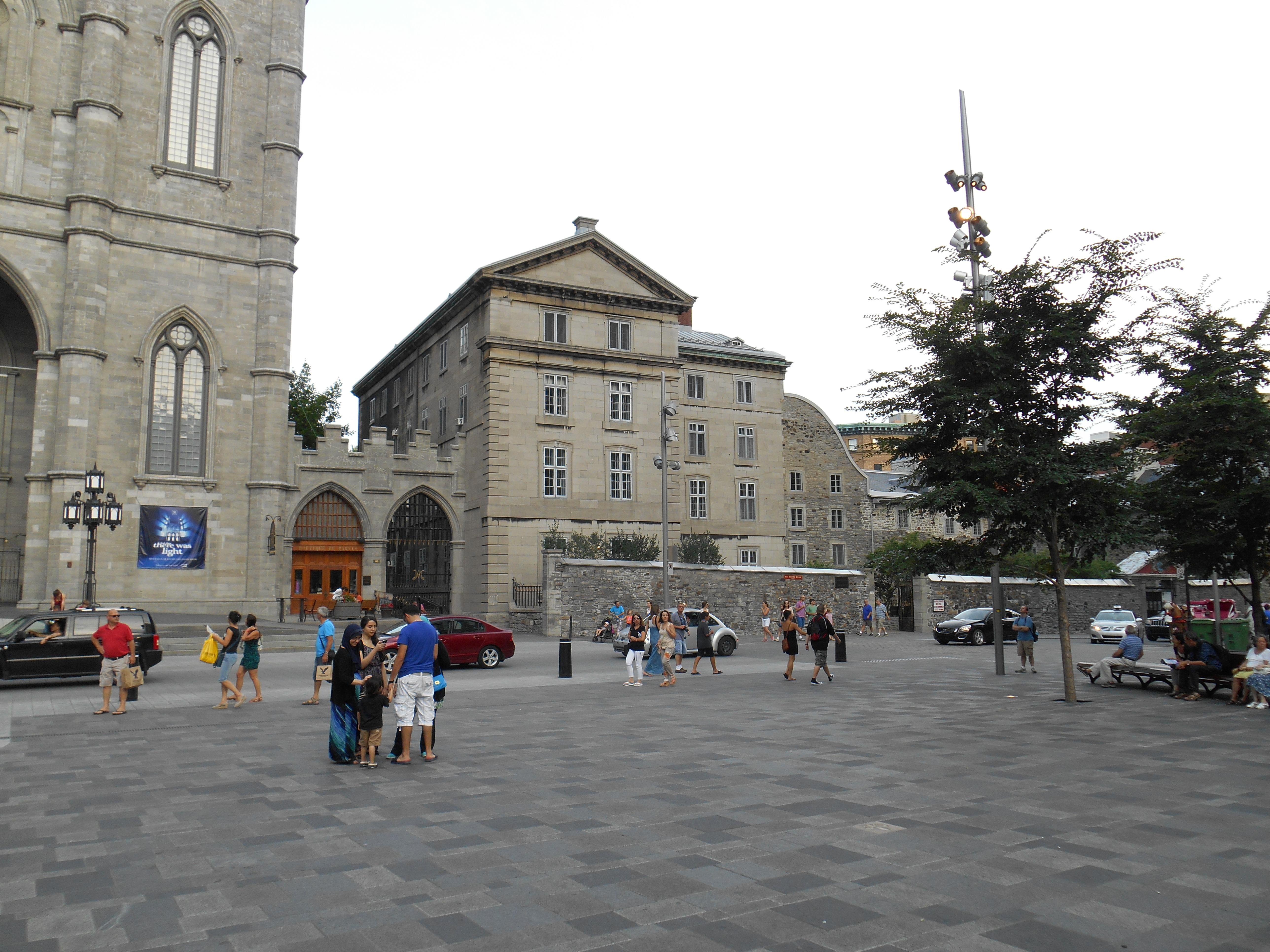 Presbytère de la paroisse Notre-Dame de Montréal (autres appellations : Presbytère de Notre-Dame, Séminaire de Saint-Sulpice de Montréal, Vieux séminaire de Saint-Sulpice), 116, rue Notre-Dame Ouest, Montréal